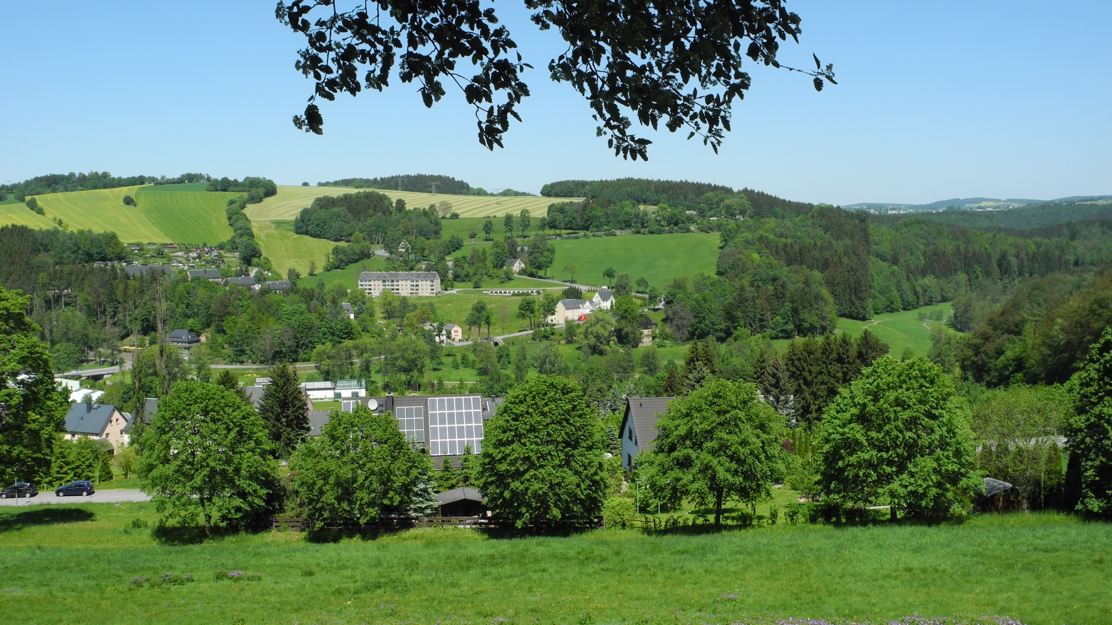 Wolkenstein - Erzgebirge bei Wiesenbad